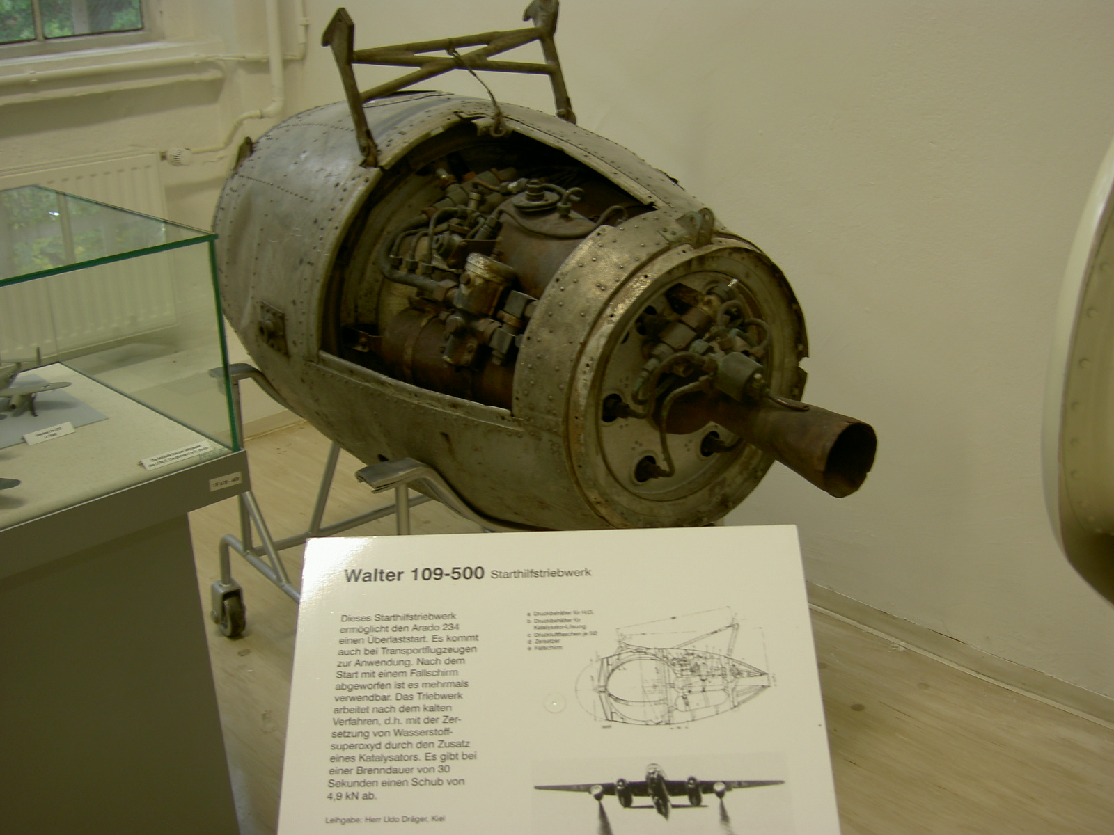 Walter - Arado Ar 234 Hilfstriebwerk im Luftwaffenmuseum Berlin-Gatow